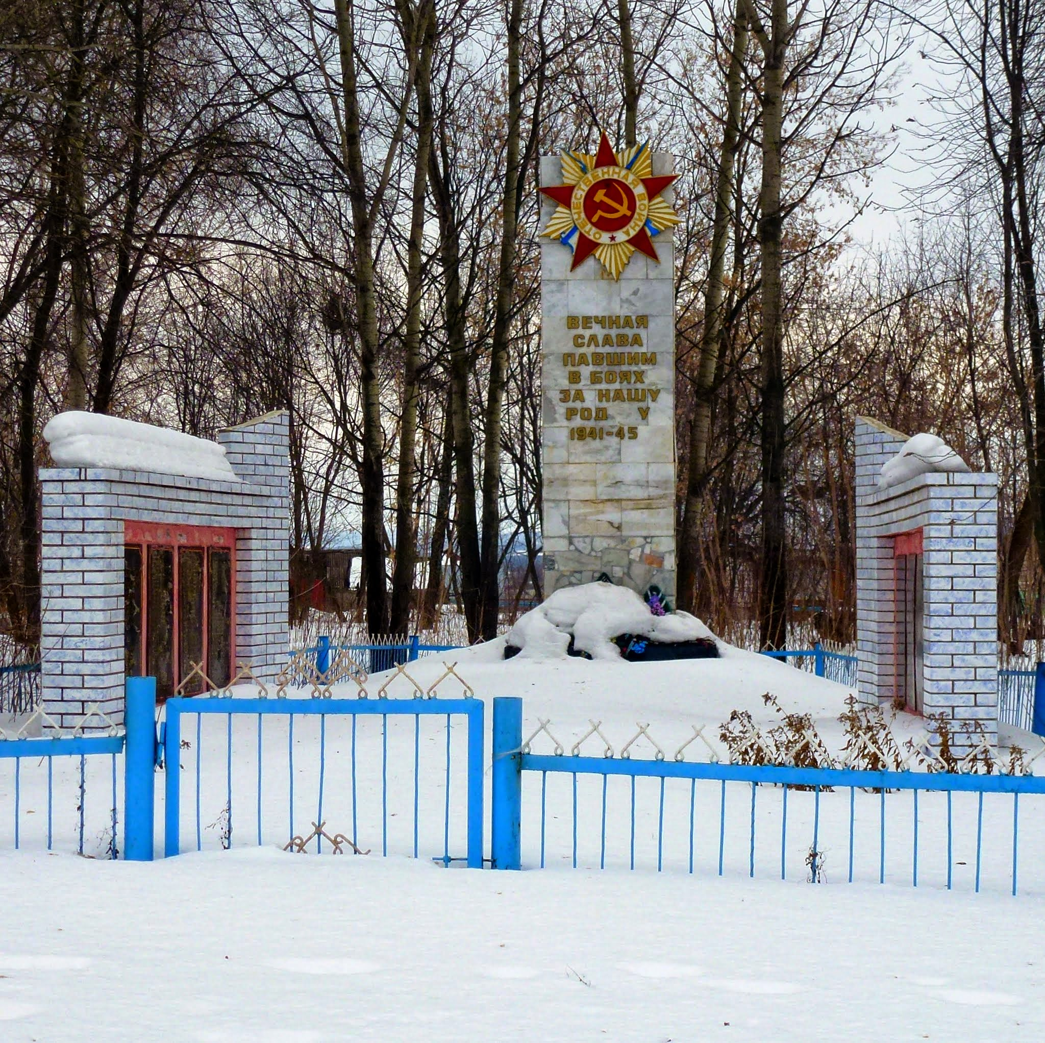 Памятник павшим в боях за Родину, Елпачиха, Пермский край